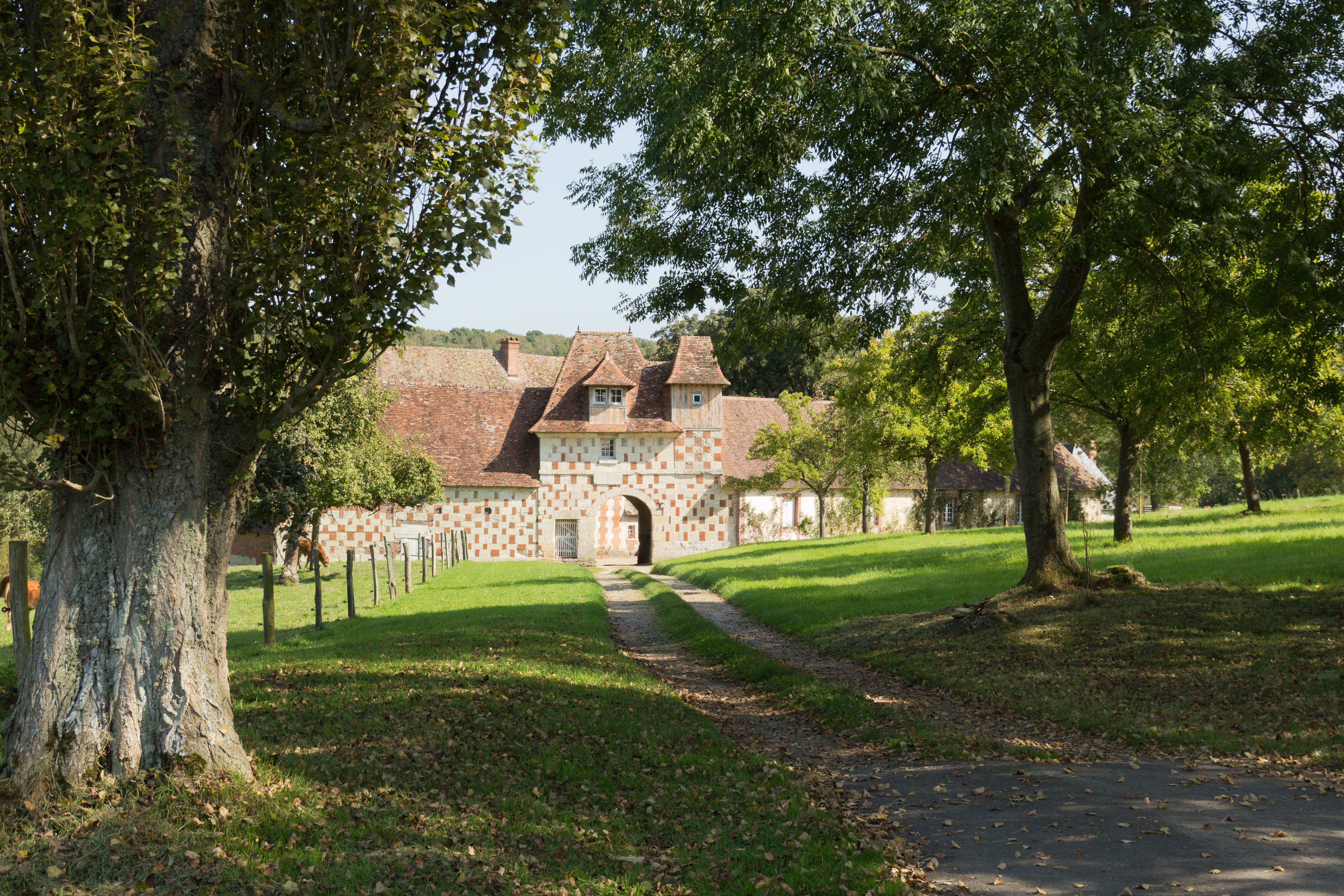 Porche du manoir de Querville à Prêtreville. .